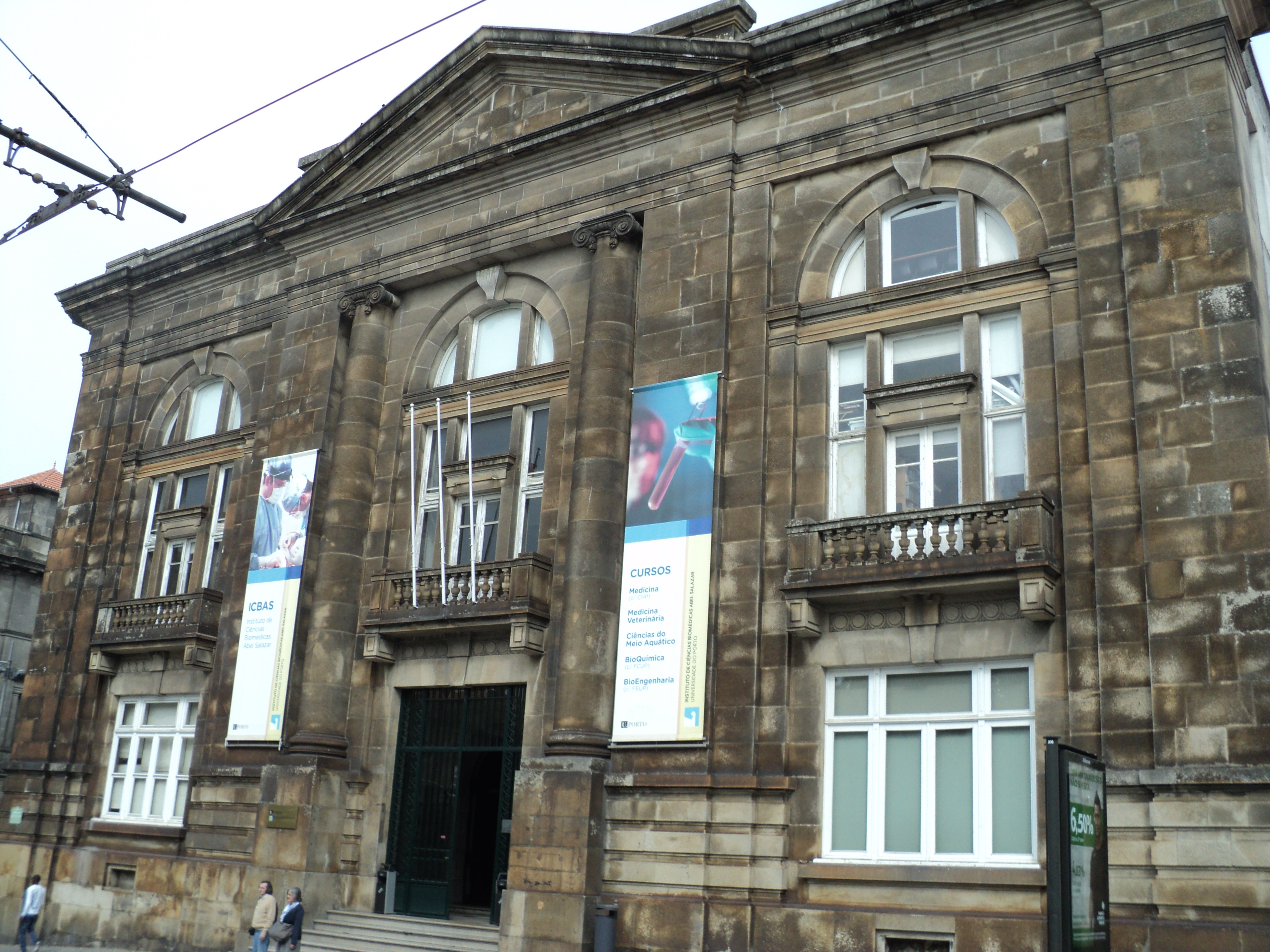 Edifício do Instituto de Ciências Biomédicas Abel Salazar This file was uploaded for Wiki Loves Monuments in Portugal with the unique identifier 97020014.